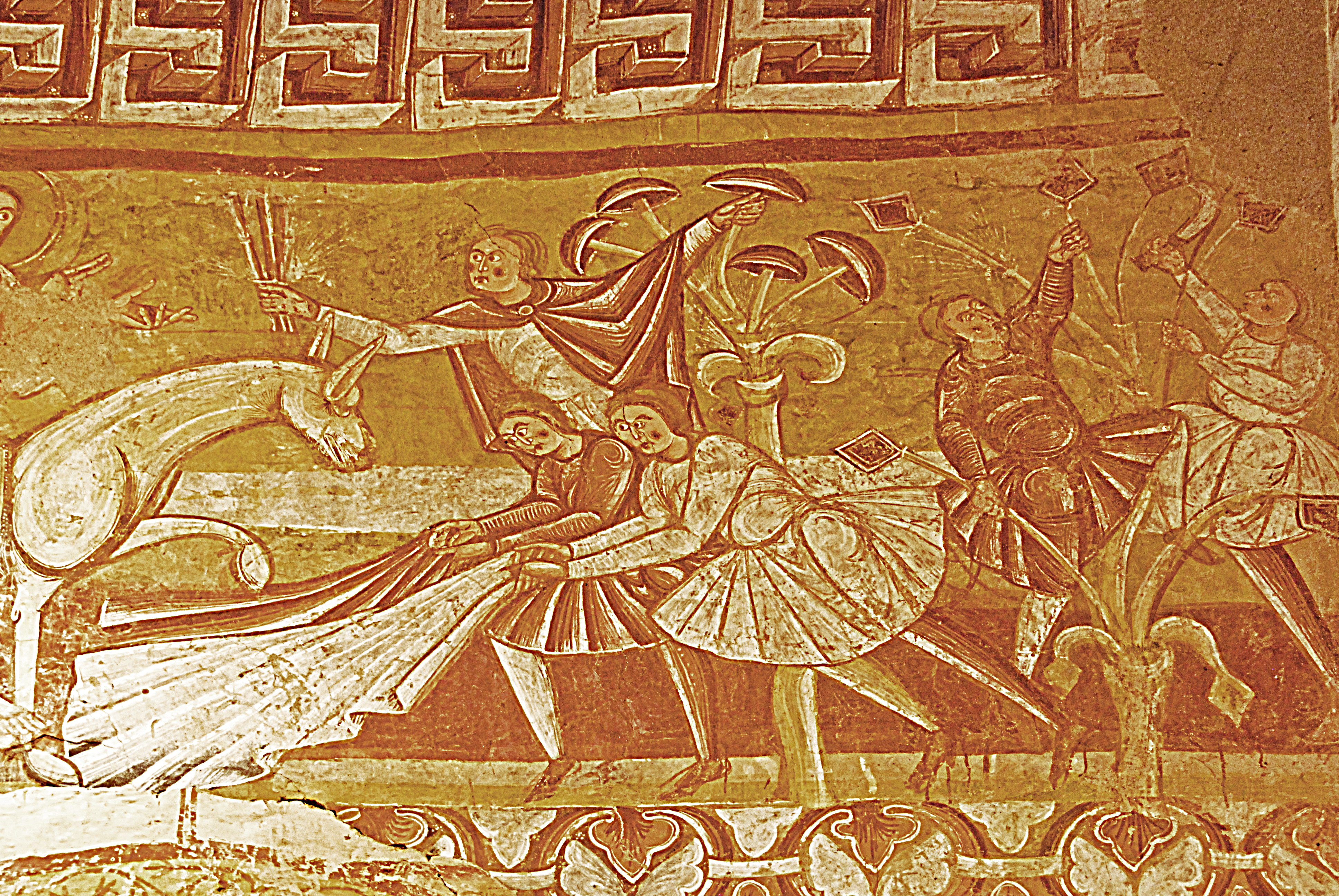 Chor, Südwand, rechts, Einzug in Jerusalem